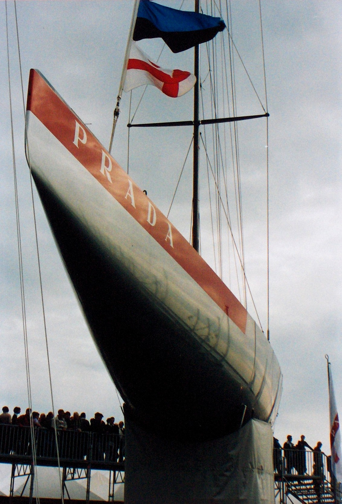 Genova - ottobre 2000 - Luna Rossa ITA45 esposta al Sanone Nautico - foto di Iacopo Lazzareschi Cervelli, concessa d'all'autore.